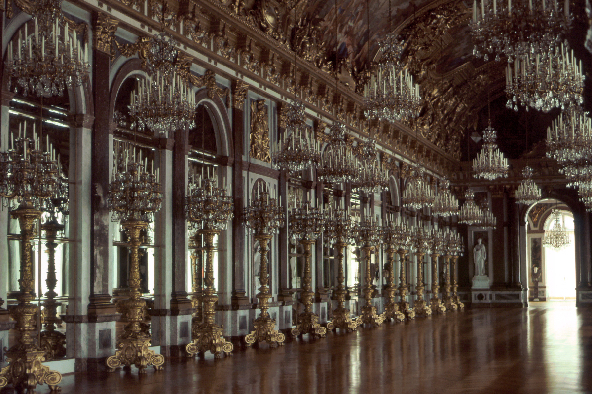 Neues Schloss Herrenchiemsee, Spiegelgalerie